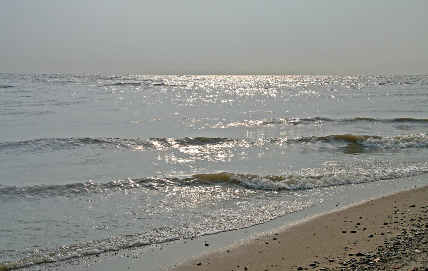 Утро на Ханке.